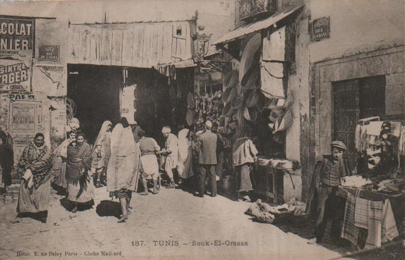 Médina de Tunis Souk el Grana